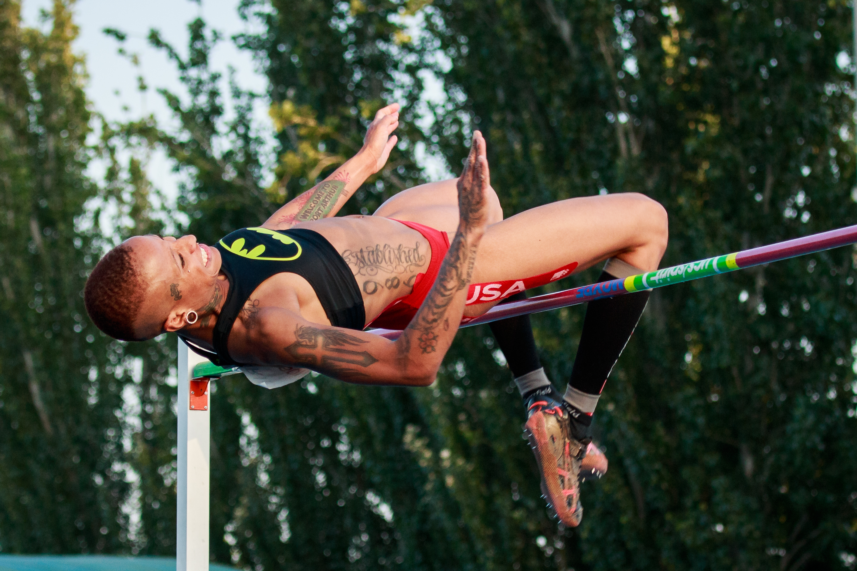 Inika McPherson (USA). Salto en alto. IAAF World Challenge. Meeting Madrid 2017. Moratalaz, Madrid.